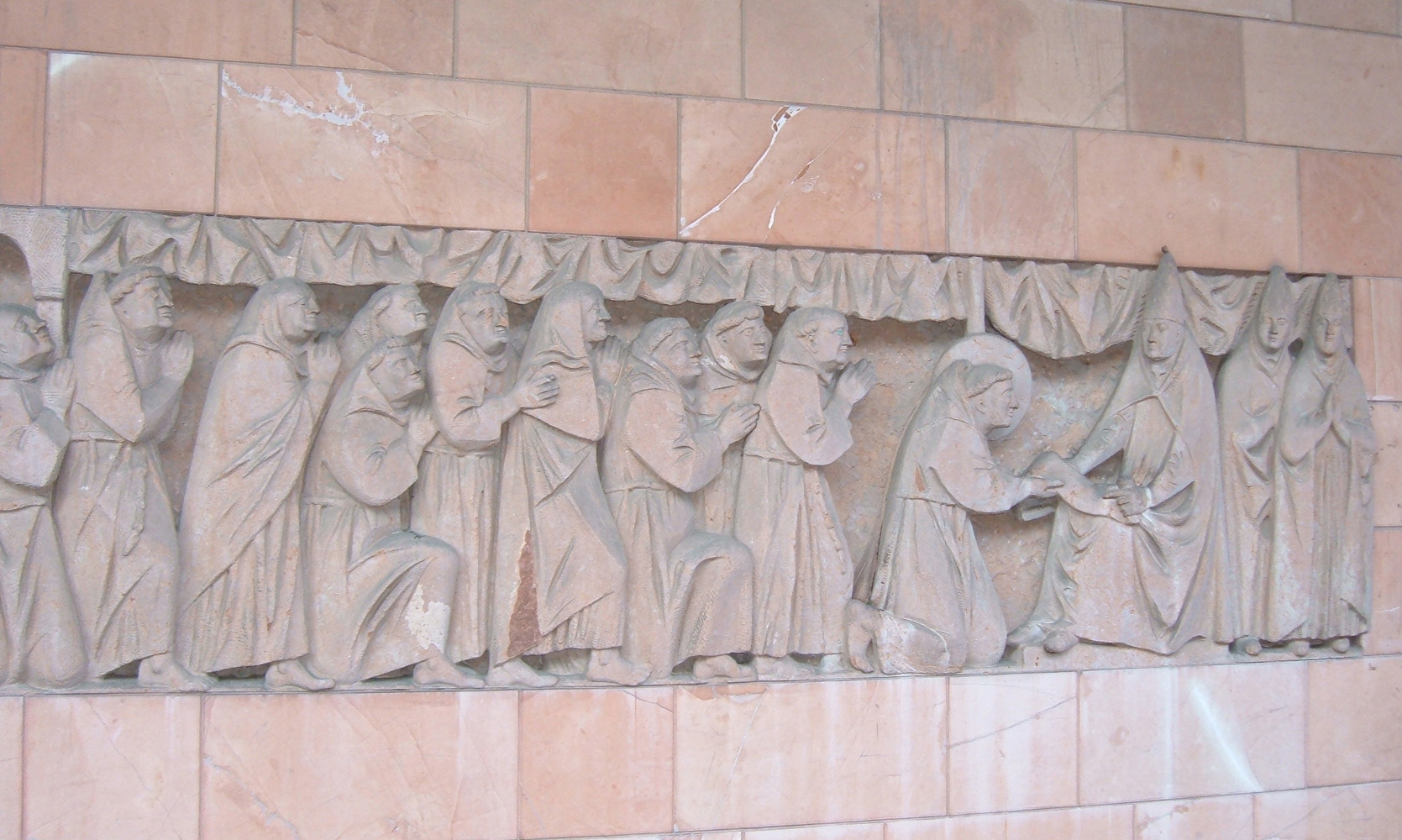 Chiesa di San Gregorio VII, a Roma, nel quartiere Aurelio. Altorilievo: "Onorio III concede la Regola ai Francescani".